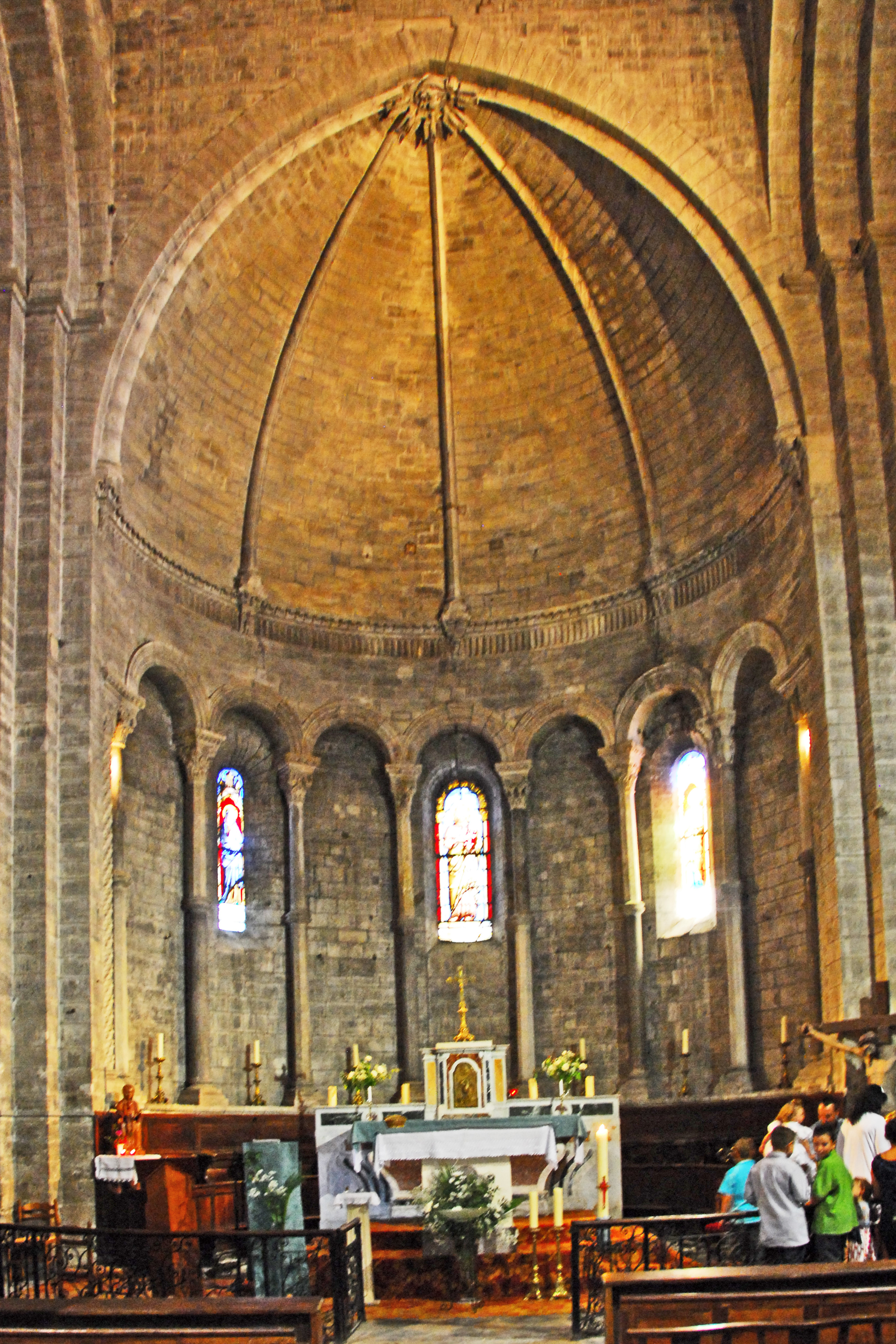 N-D-du-Lac du Le Thor, Chorhaupt